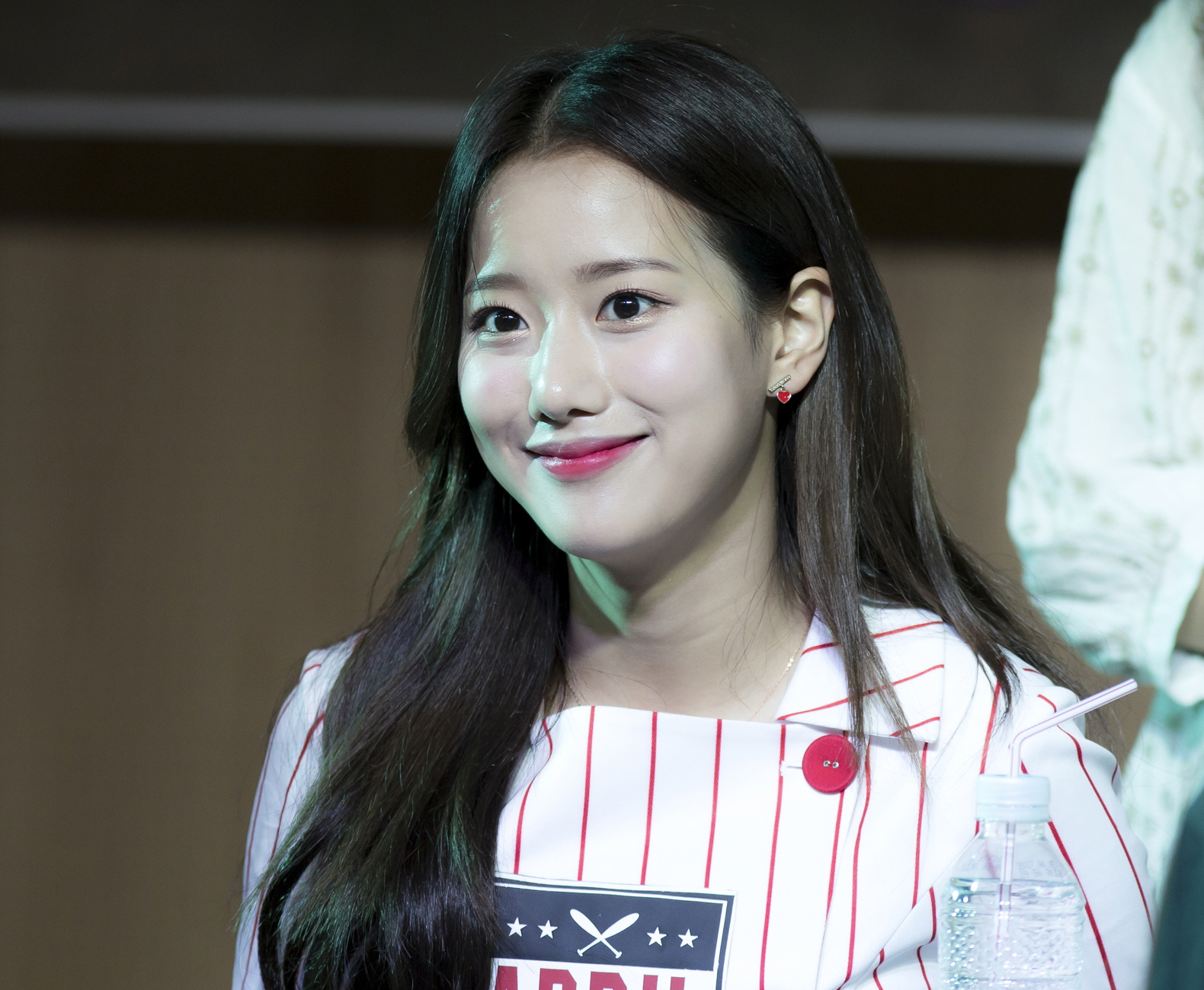 170624 수원팬싸인회